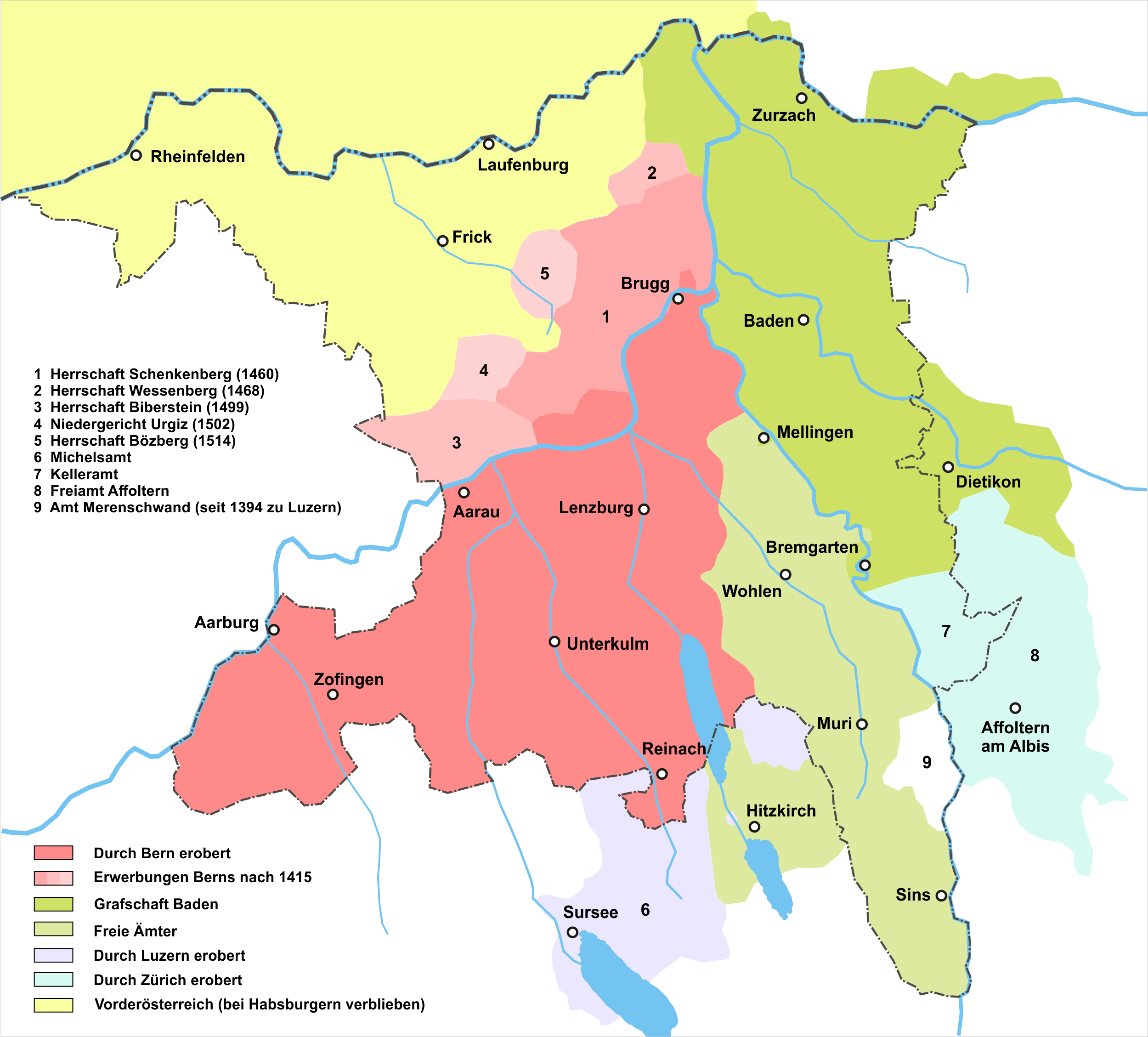 Der Aargau nach der Eroberung durch die Eidgenossen im Jahr 1415 basierend auf der der Vorlage File:Aargau 1415.png